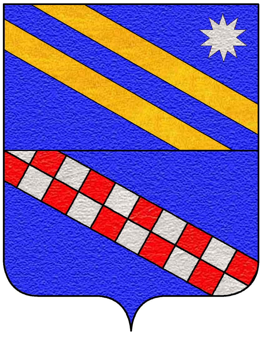 Stemma della famiglia Di Gravina